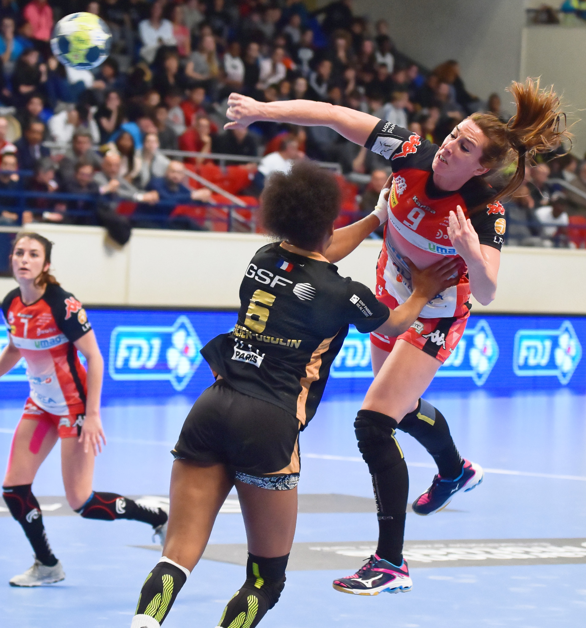 Rencontre Issy Paris Hand / ES Besançon. A Coubertin, le 10 janvier 2018.